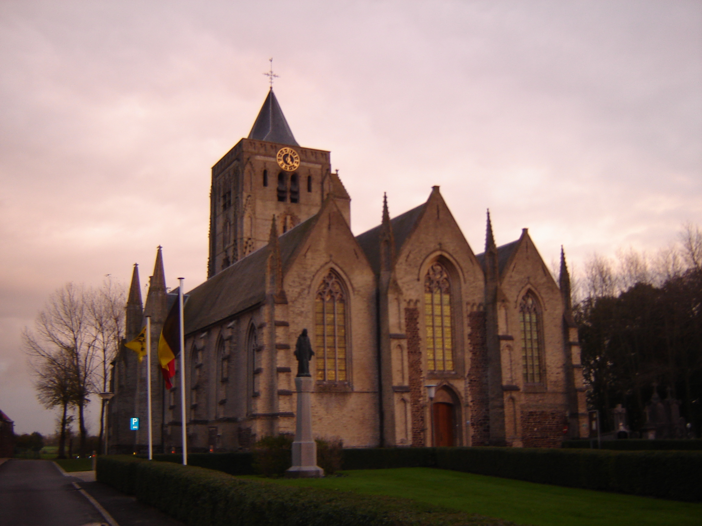 Sint Audomaruskerk in Beveren-aan-de-IJzer, Alveringem. Saint Audomar Church in Beveren, Alveringem, West-Flanders, Belgium